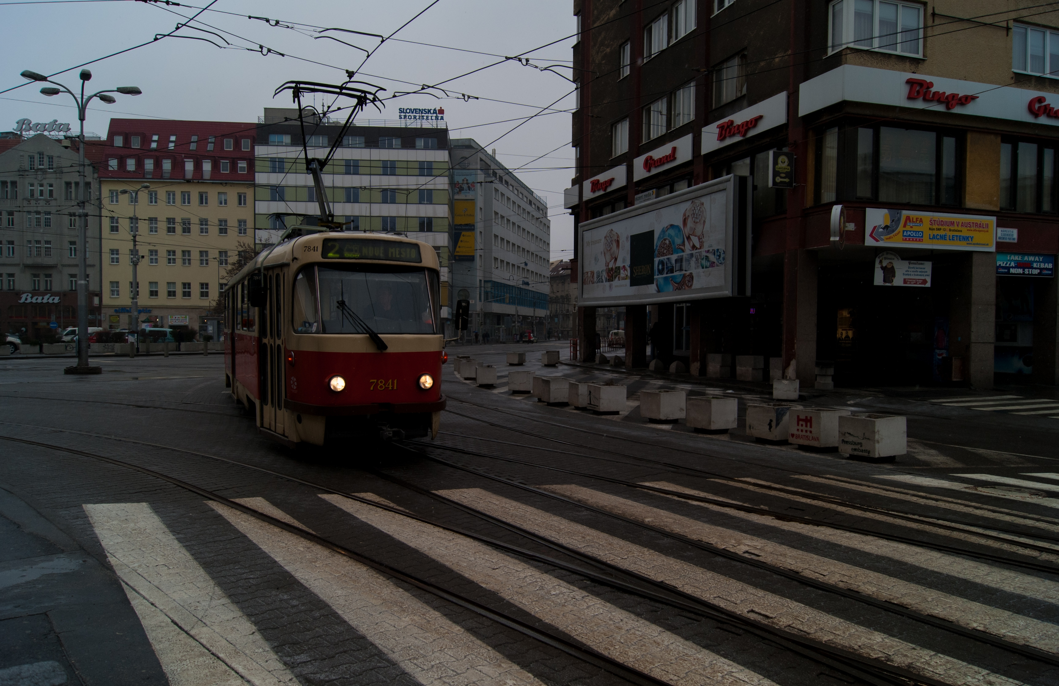 Tatra T3G tramway in Kamenné námestie, Bratislava, Slovakia